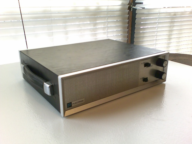 Plectron R520 radio receiver